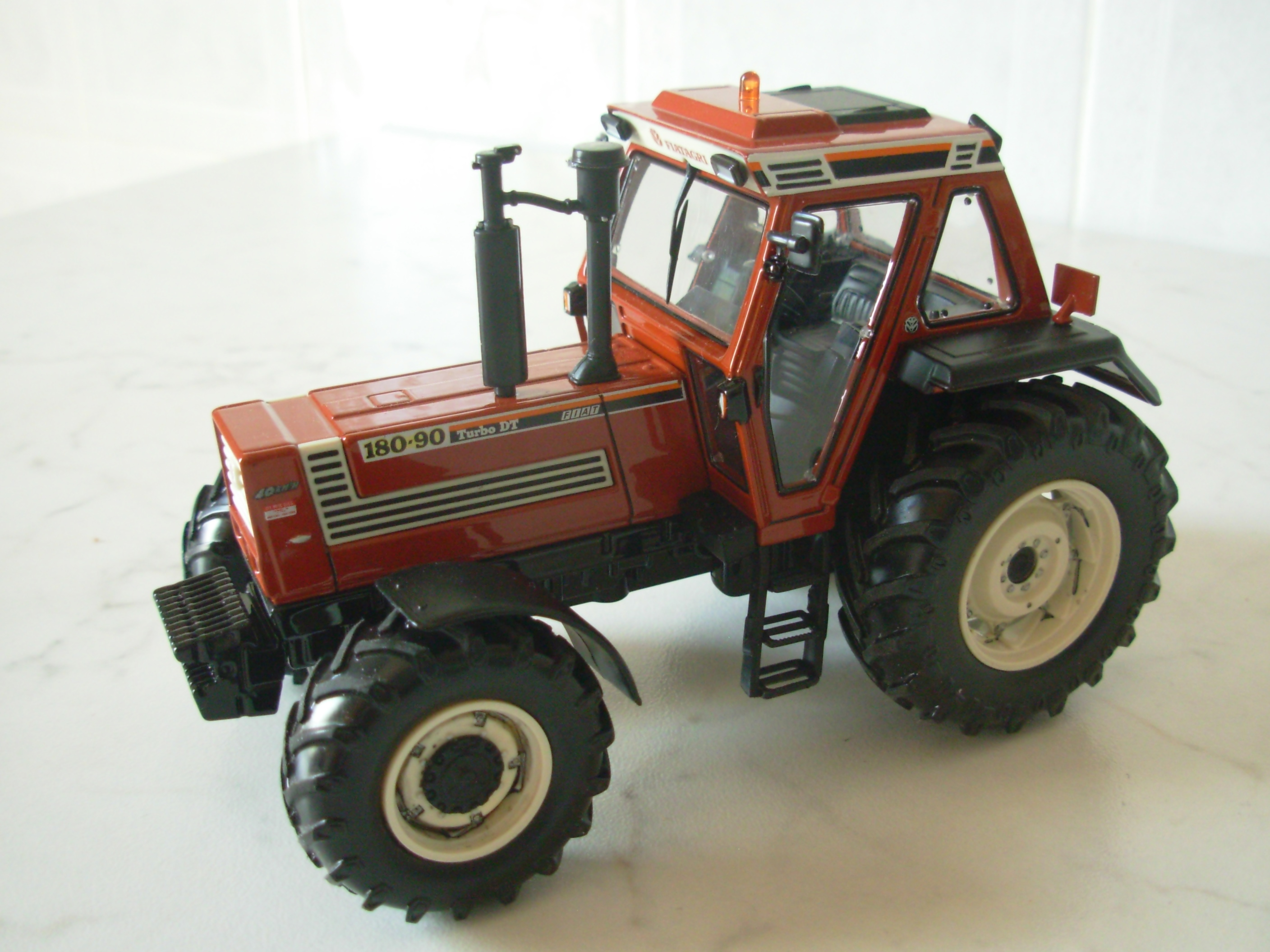 Modellino trattore Fiatagri 180-90 Ros